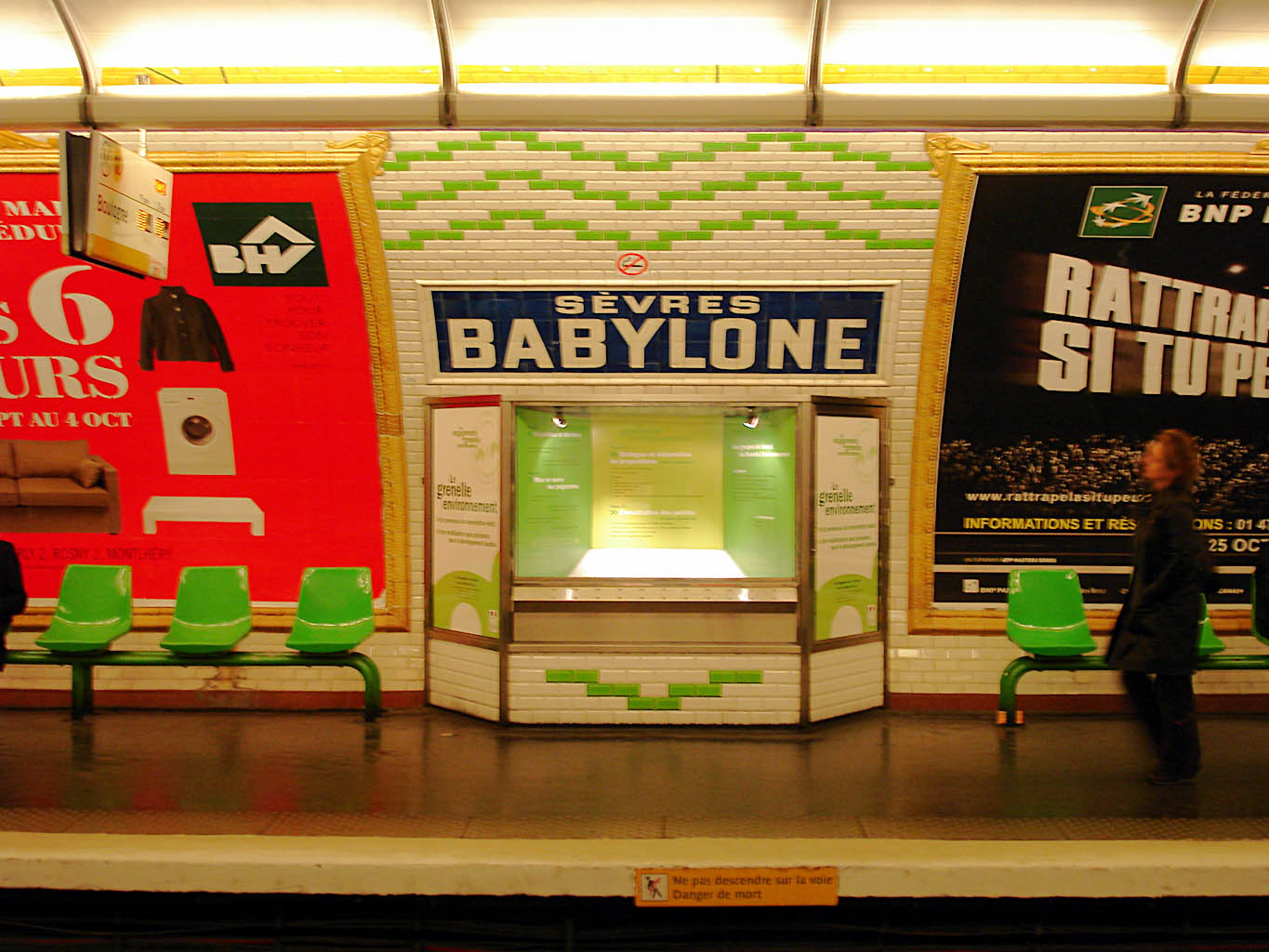 Station Sèvres - Babylone de la ligne 10 du métro de Paris, France.